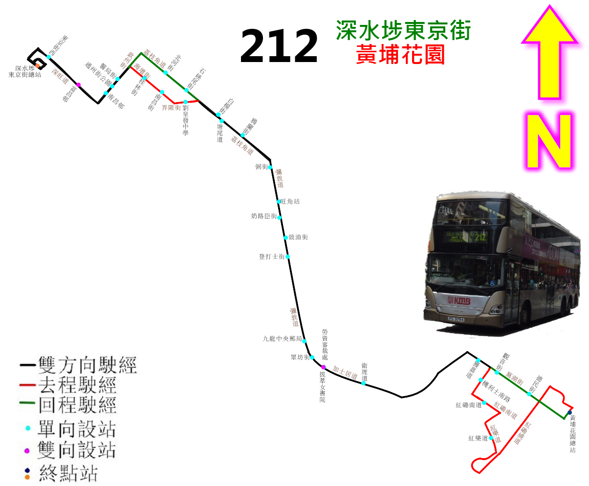 中文（香港）: 九巴212線的走線圖